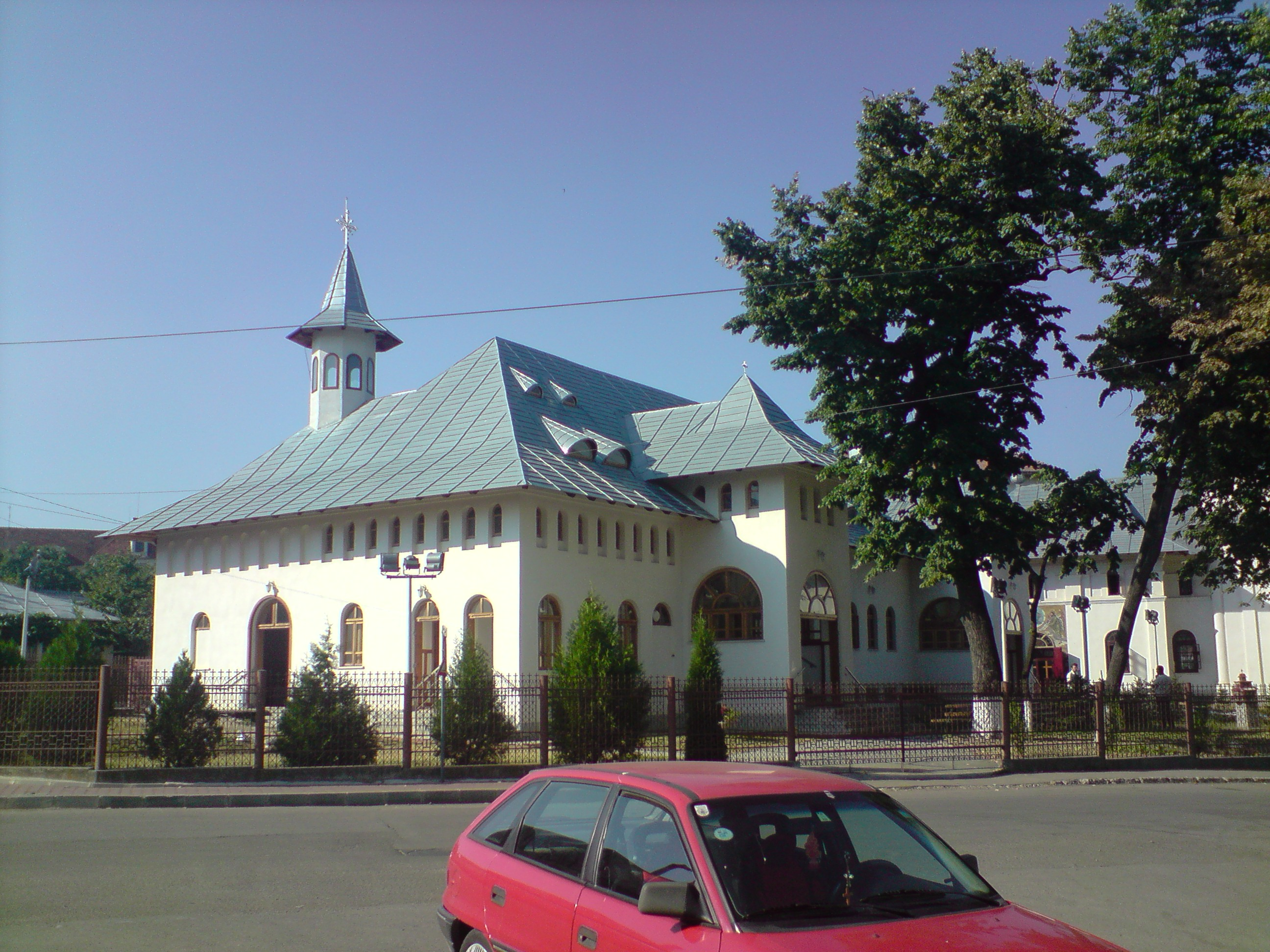 Biserica Sfantul Ioan 2